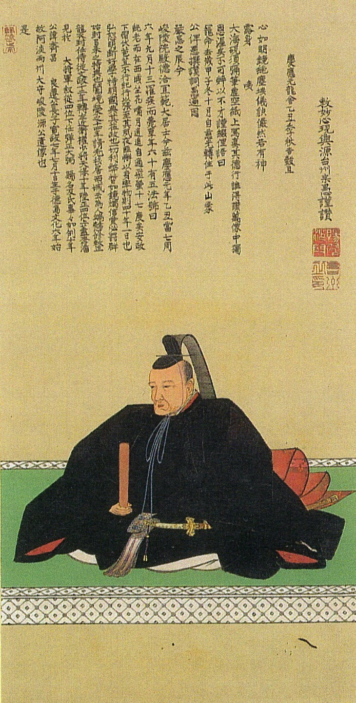 蜂須賀斉昌の肖像。